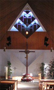 Stadt Regen, Pfarrkirche, neuer Altar, selbst fotografiert am 25.12.2004